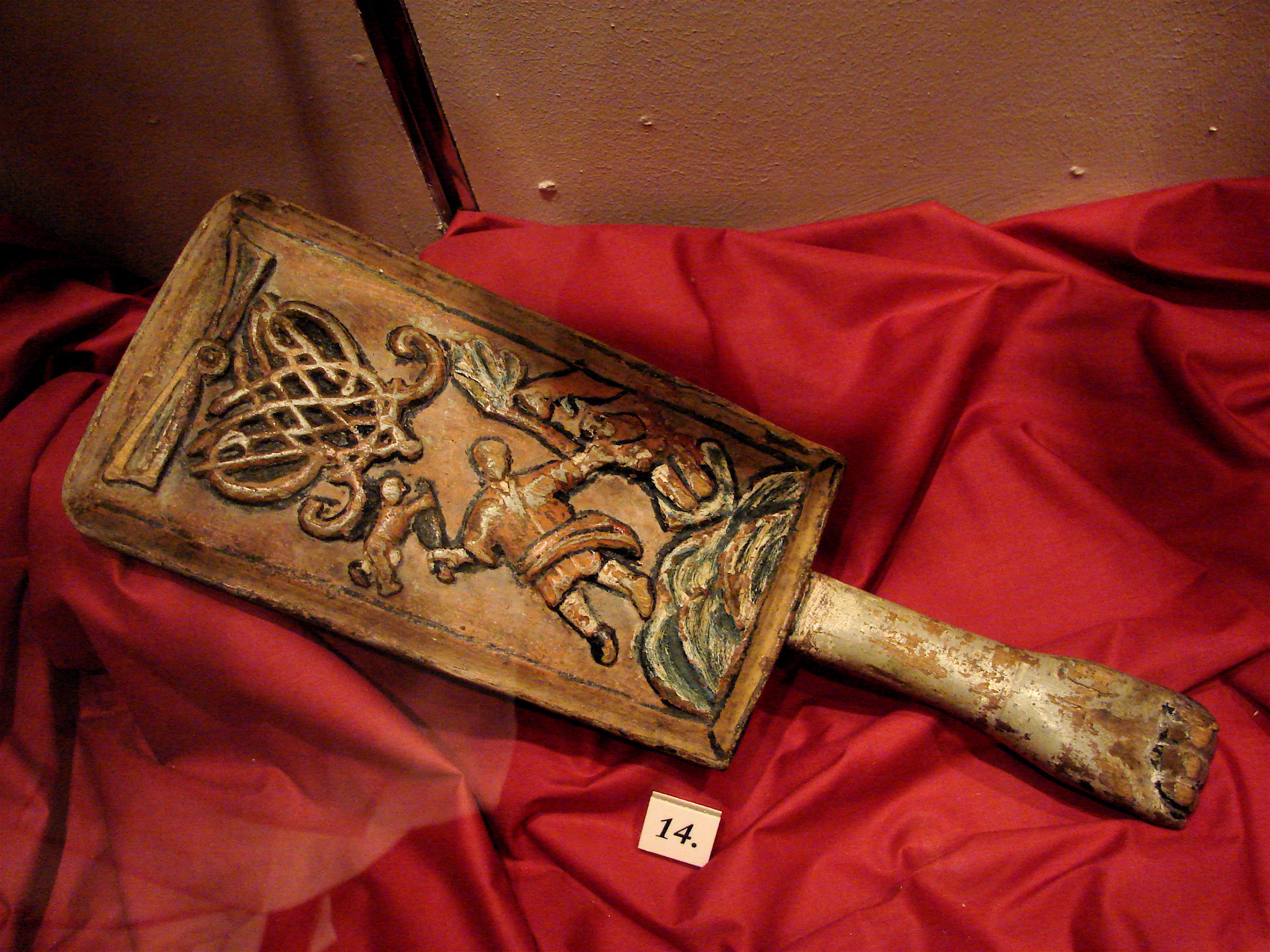 Banketræ/banketre med Kong Salomons Dom og spejlmonogram, Telemark Museum, Skien